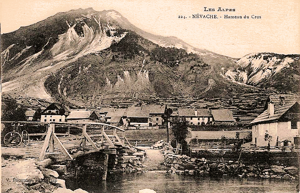 Celliers du hameau de Cros